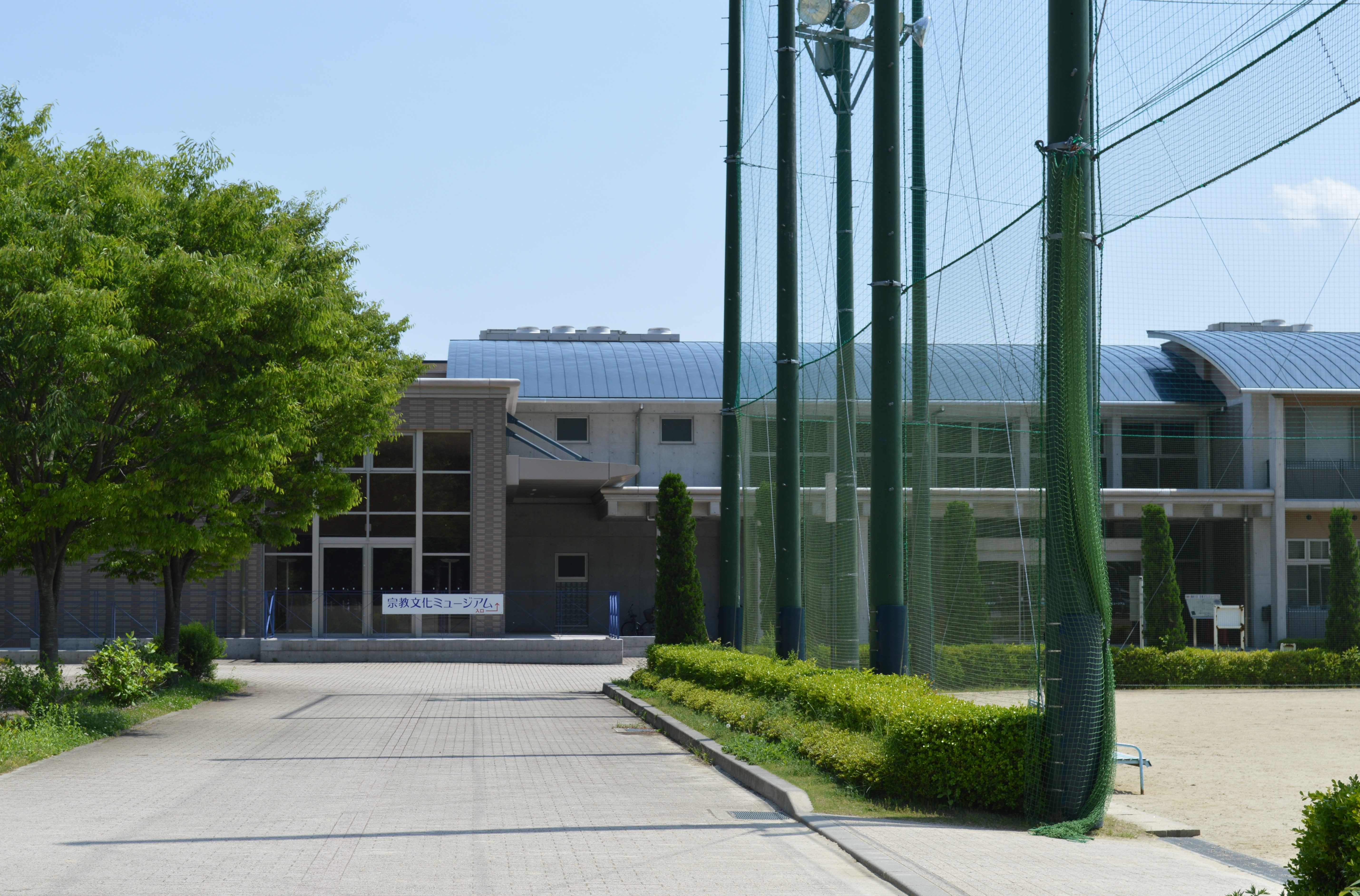 佛教大学広沢キャンパスの宗教文化ミュージアム、右は広沢グラウンド